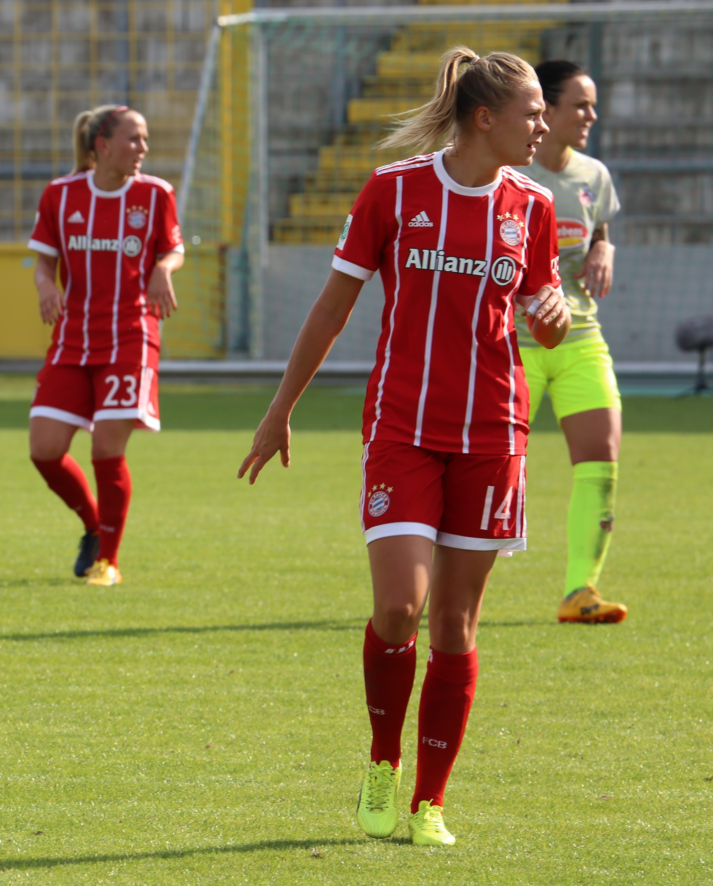 Fridolina Rolfö beim Frauen-Bundesliga-Spiel FC Bayern München gegen 1. FC Köln am 24. September 2017 im Stadion an der Grünwalder Straße (Ergebnis war 2:0)